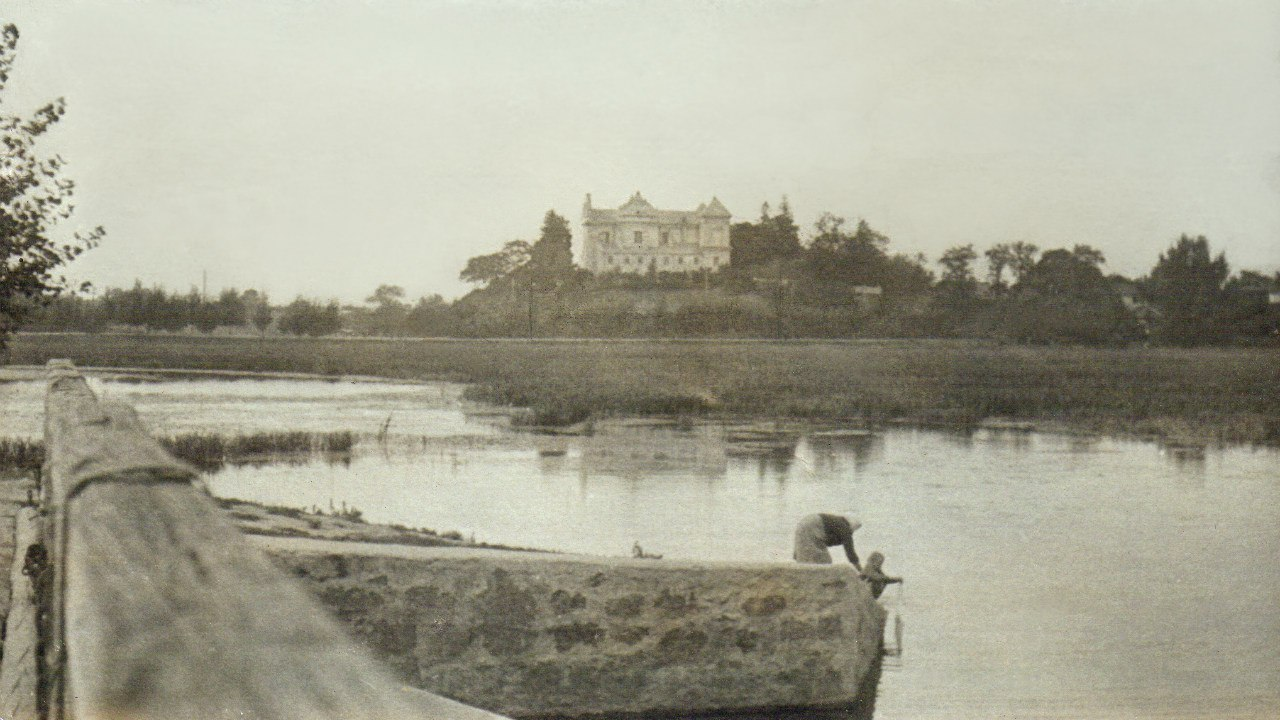 Костел Полонне